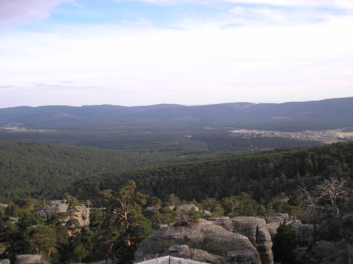 taken by Valdoria august 2006. Al fondo se ven los pueblos de Duruelo y Covaleda.